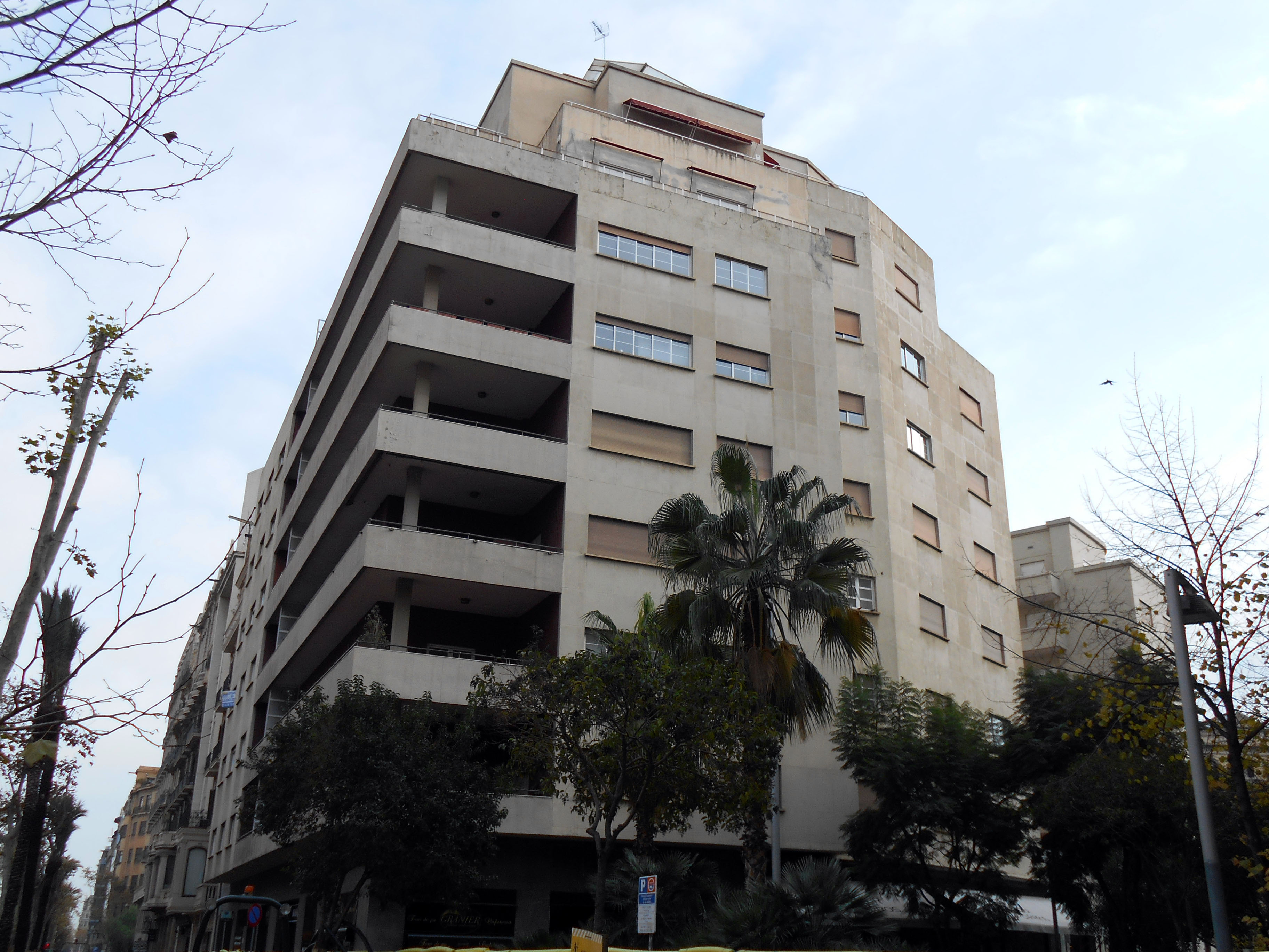 Bloc Diagonal, de Germán Rodríguez Arias y Ricardo de Churruca.